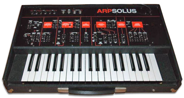 sintetizzatore ARP Solus Licensing Categoria:Sintetizzatori Categoria:Sintetizzatori ARP